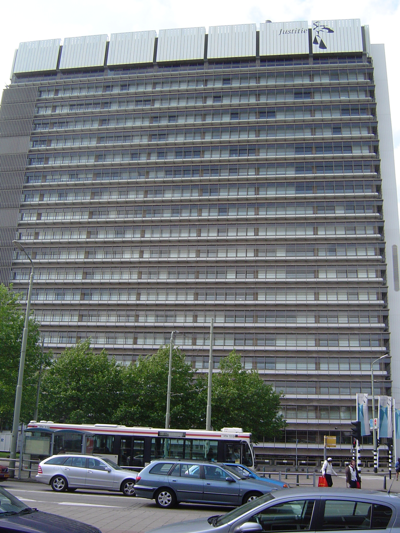 Ministerie van Justitie, The Hague Holland. Architecten: A. Lucas en H.E. Niemeijer